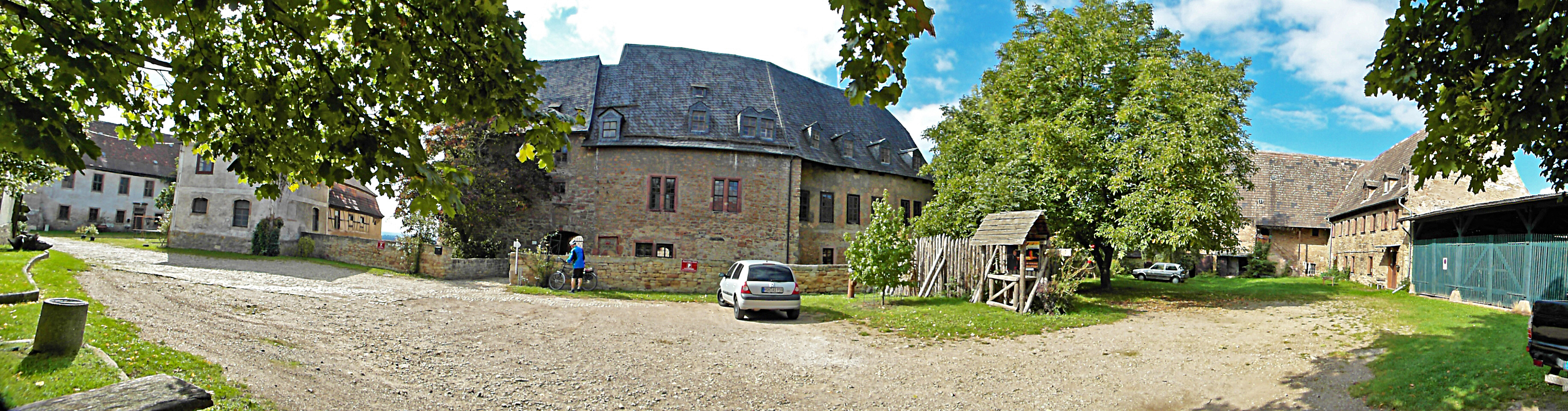 hinterer Burghof mit Museum und Kavaliershäusern